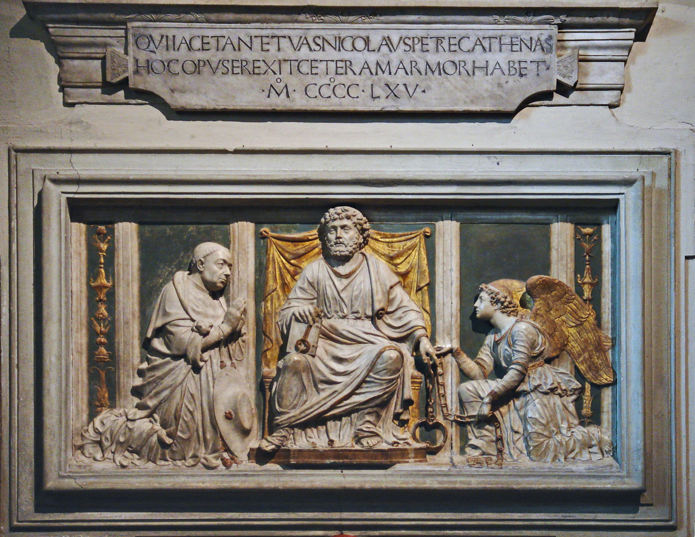 San Pietro in Vincoli; Grabmonument für Nikolaus von Kues